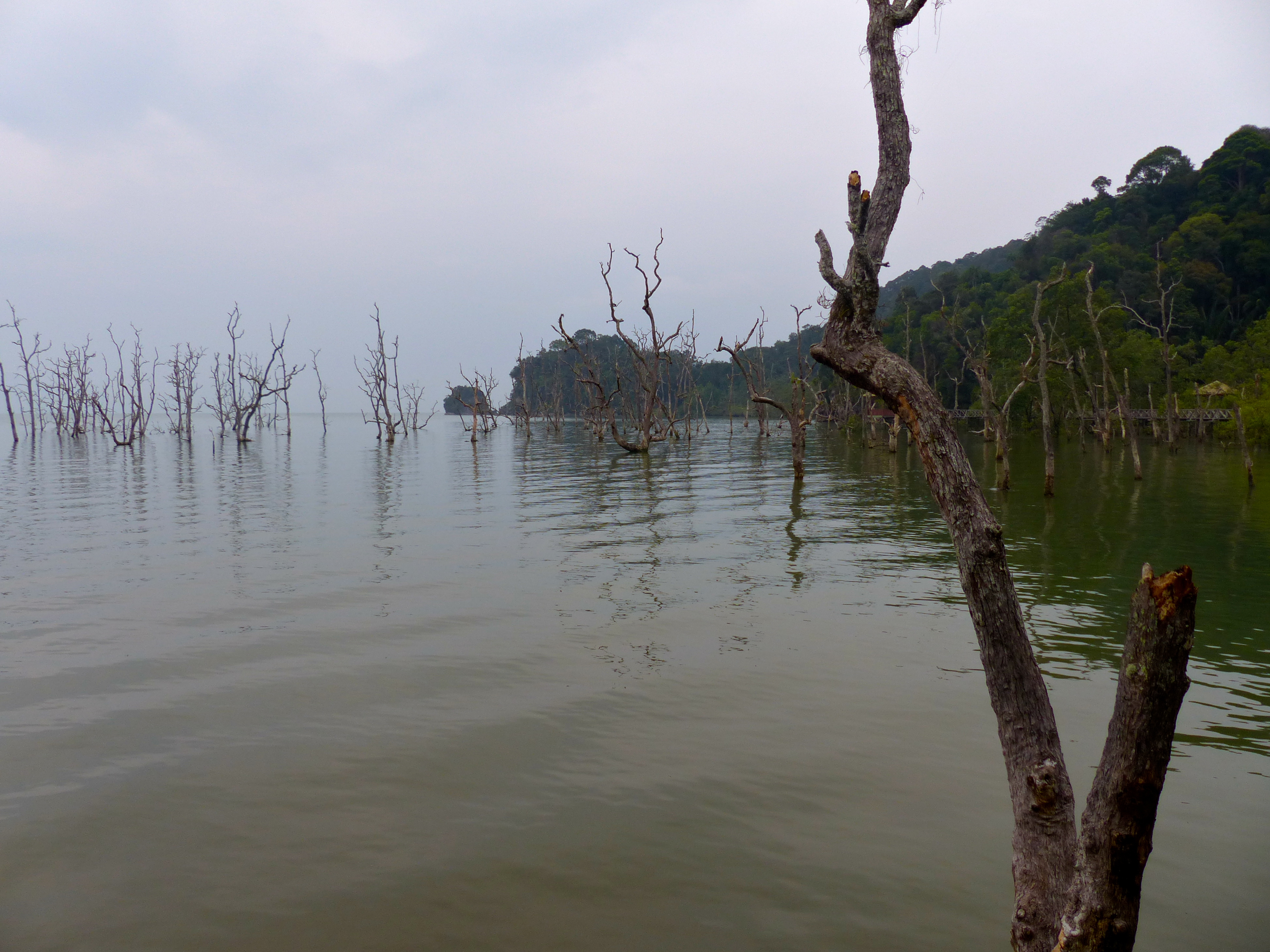 Bako NP, Sarawak, MALAYSIA